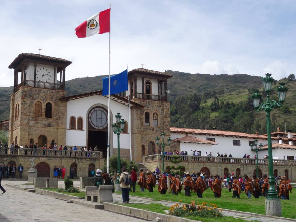 Alcaldes pedáneos de Chacas en el día domingo.